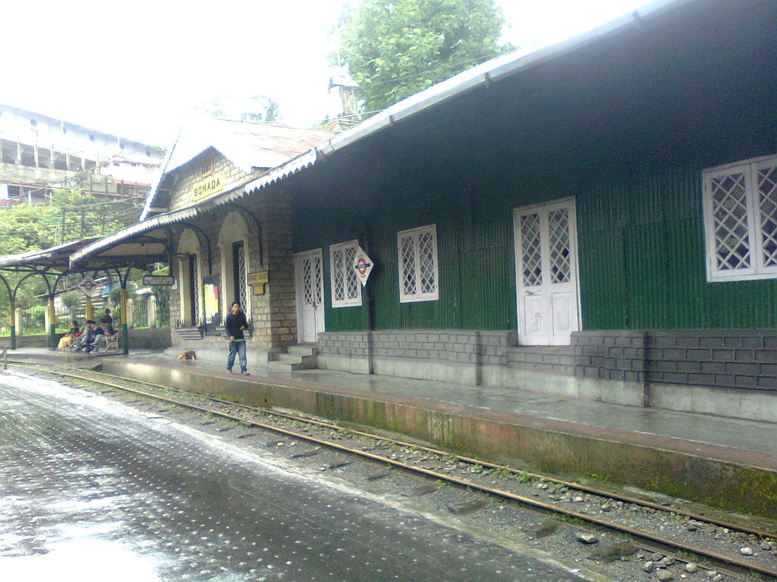 Sonada station